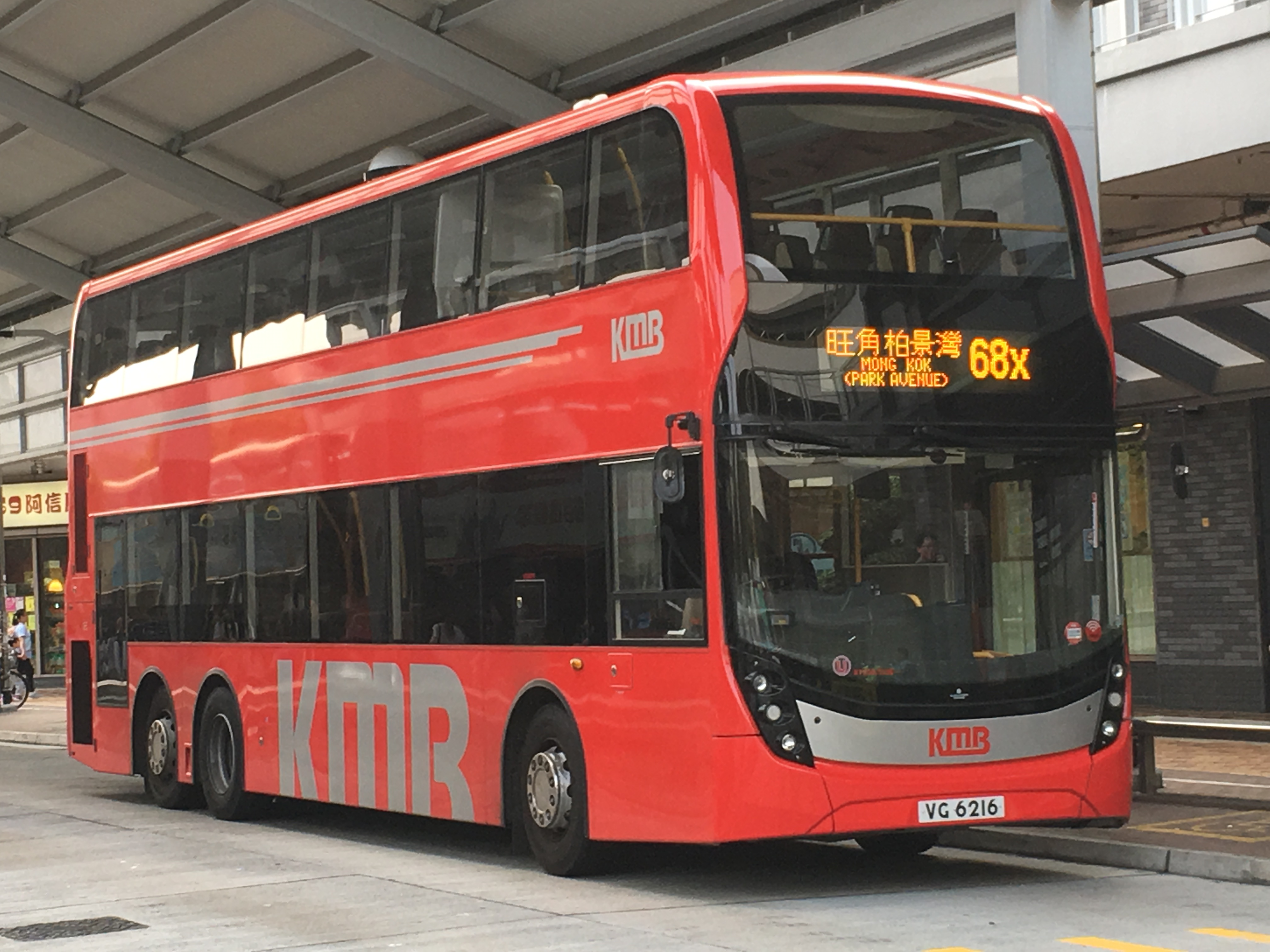 This photo is taken in Hung Fuk Estate.